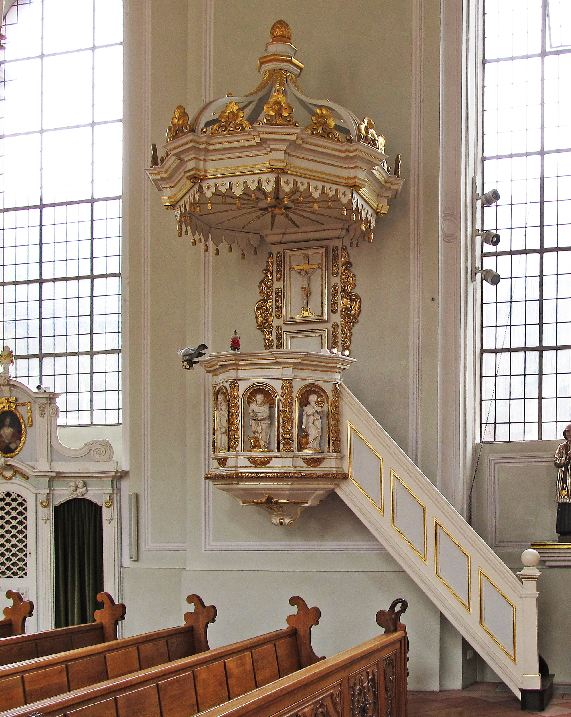 Kanzel der Basilika St. Johann in Saarbrücken, Saarland